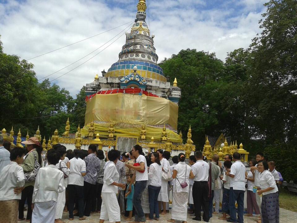 วัดพระธาตุจอมแจ้ง อำเภอพาน จังหวัดเชียงราย